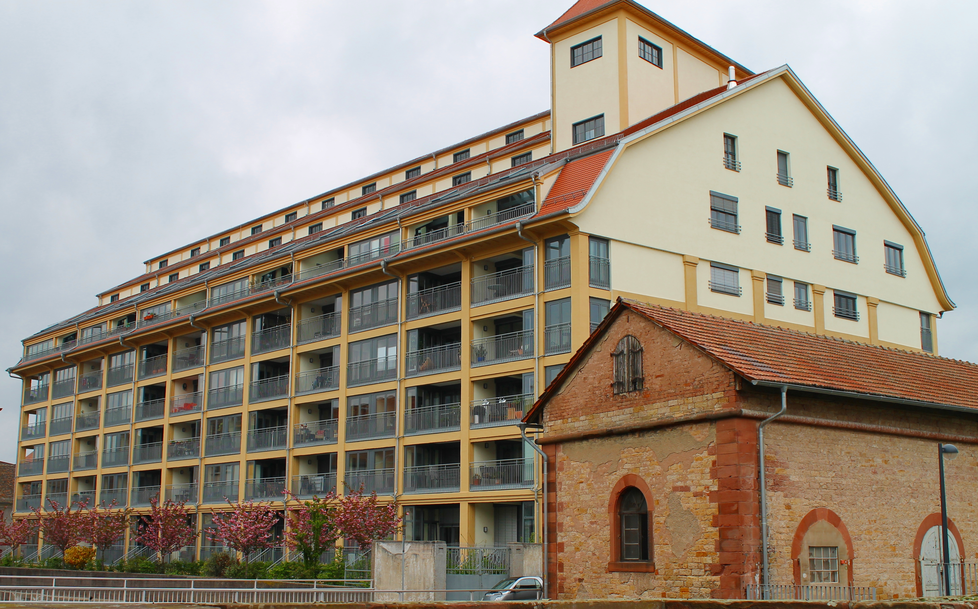 Weißquartierstraße 23: ehemaliges Hafermagazin; monumentaler viergeschossiger Ziegelbau, Mansarddachbau, 1914–16